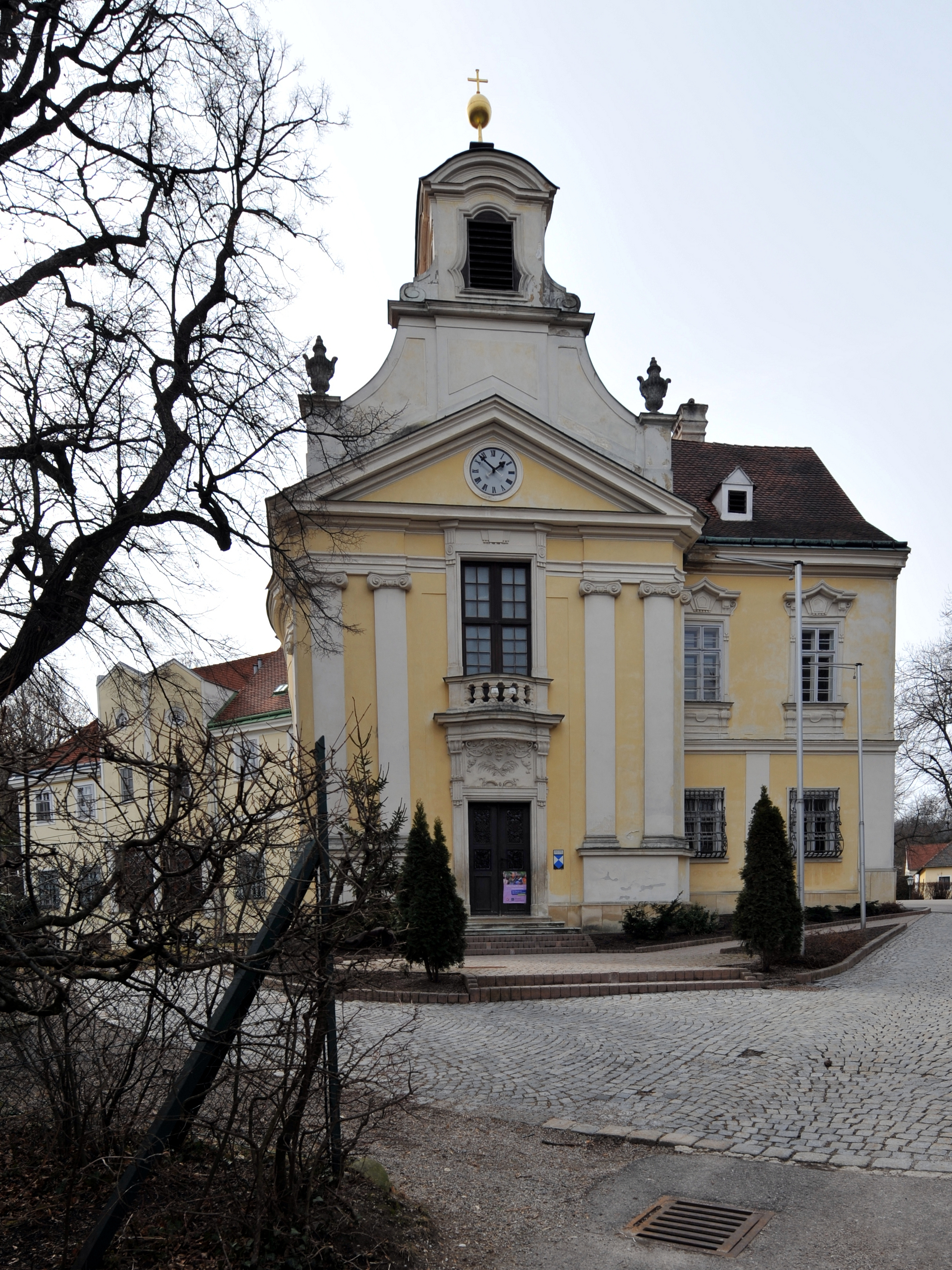 Katholische Pfarrkirche hl. Johannes Nepomuk